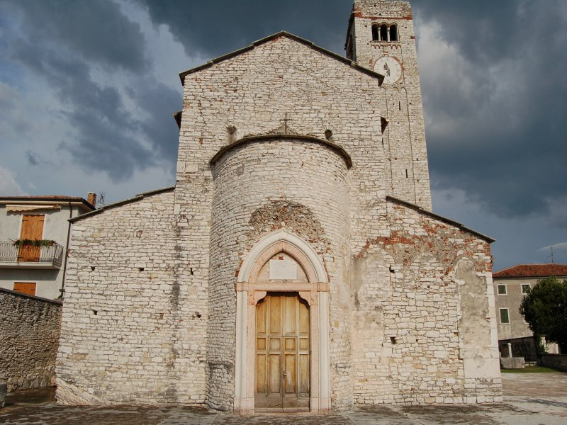 Ingresso della pieve romanica di San Giorgio di Valpolicella